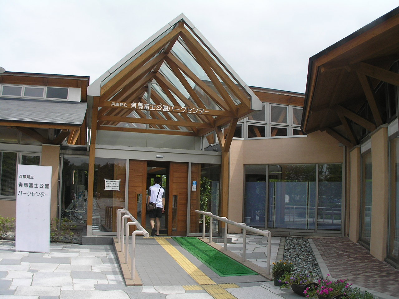 兵庫県立有馬富士公園/県内最大の都市公園/豊かな自然を活かし、「自然休養型の文化公園」を基本テーマとした広域都市公園です。多目的ホールや会議室を備えたパークセンターや、生態園、棚田、かやぶき民家などの野外施設が整備されています。(財団法人 兵庫県園芸・公園協会） ～photo by Autumn Snake 【おぉたむ すねィく探検隊】 arimahuji_park